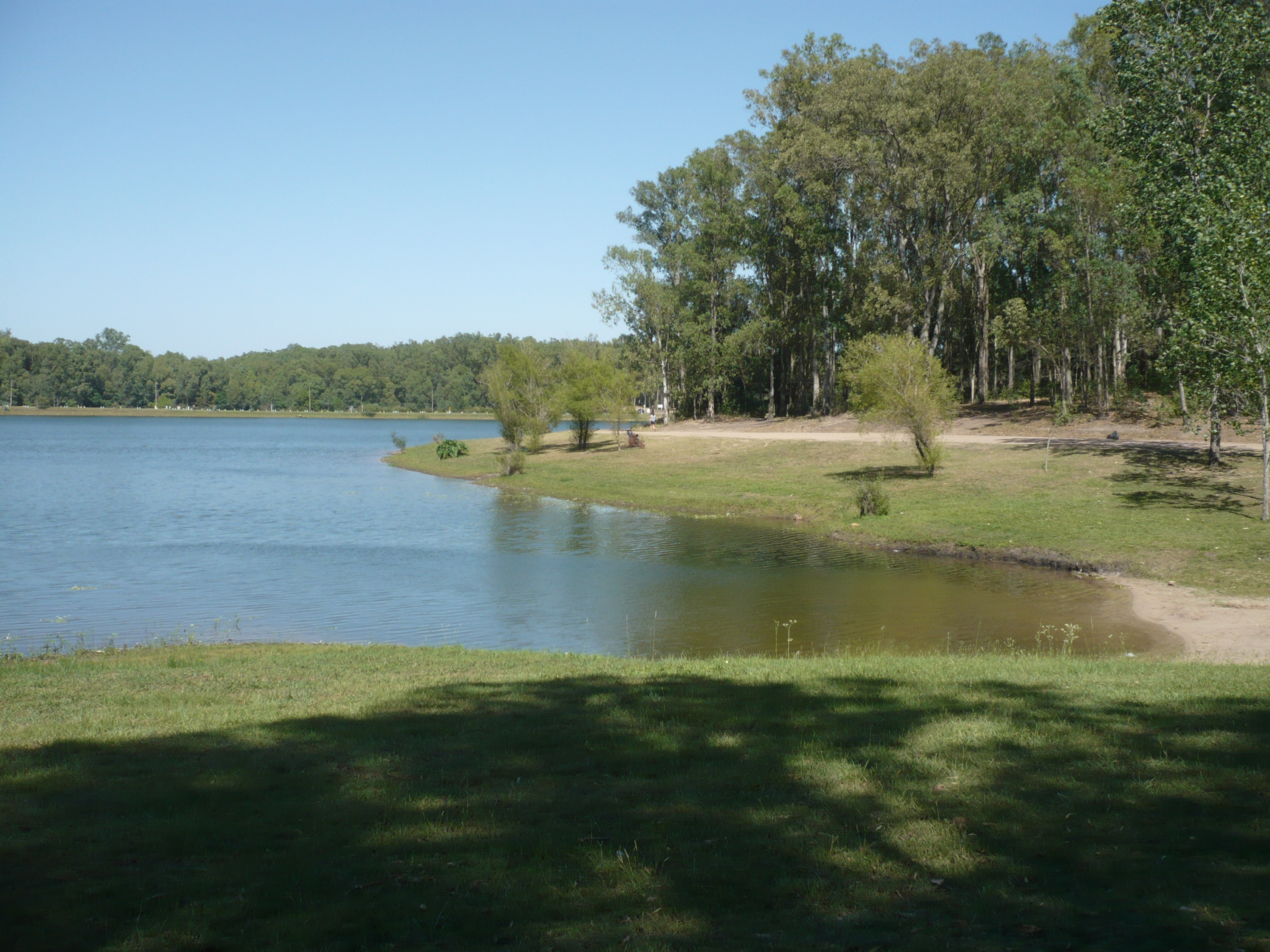 Foto de uno de los lagos artificiales en el Balneario Iporá, Uruguay.